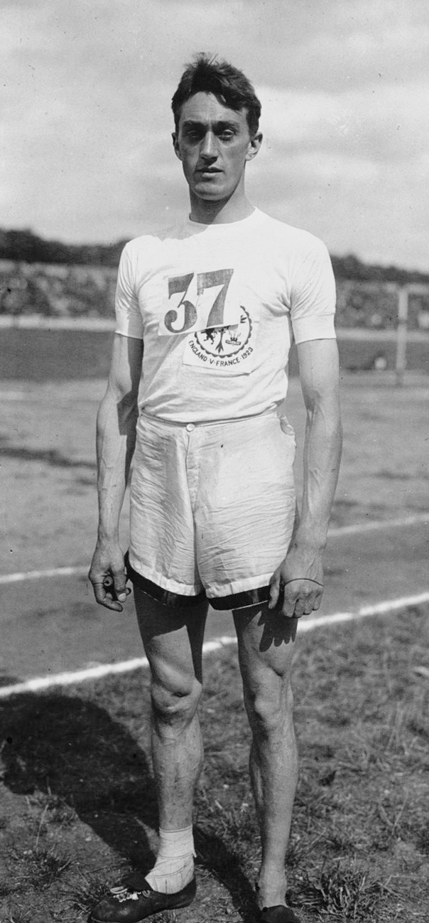 Stade Pershing : match athlétisme France-Angleterre : Gaby, gagnant du 110 mètres haies : [photographie de presse] / Agence Meurisse